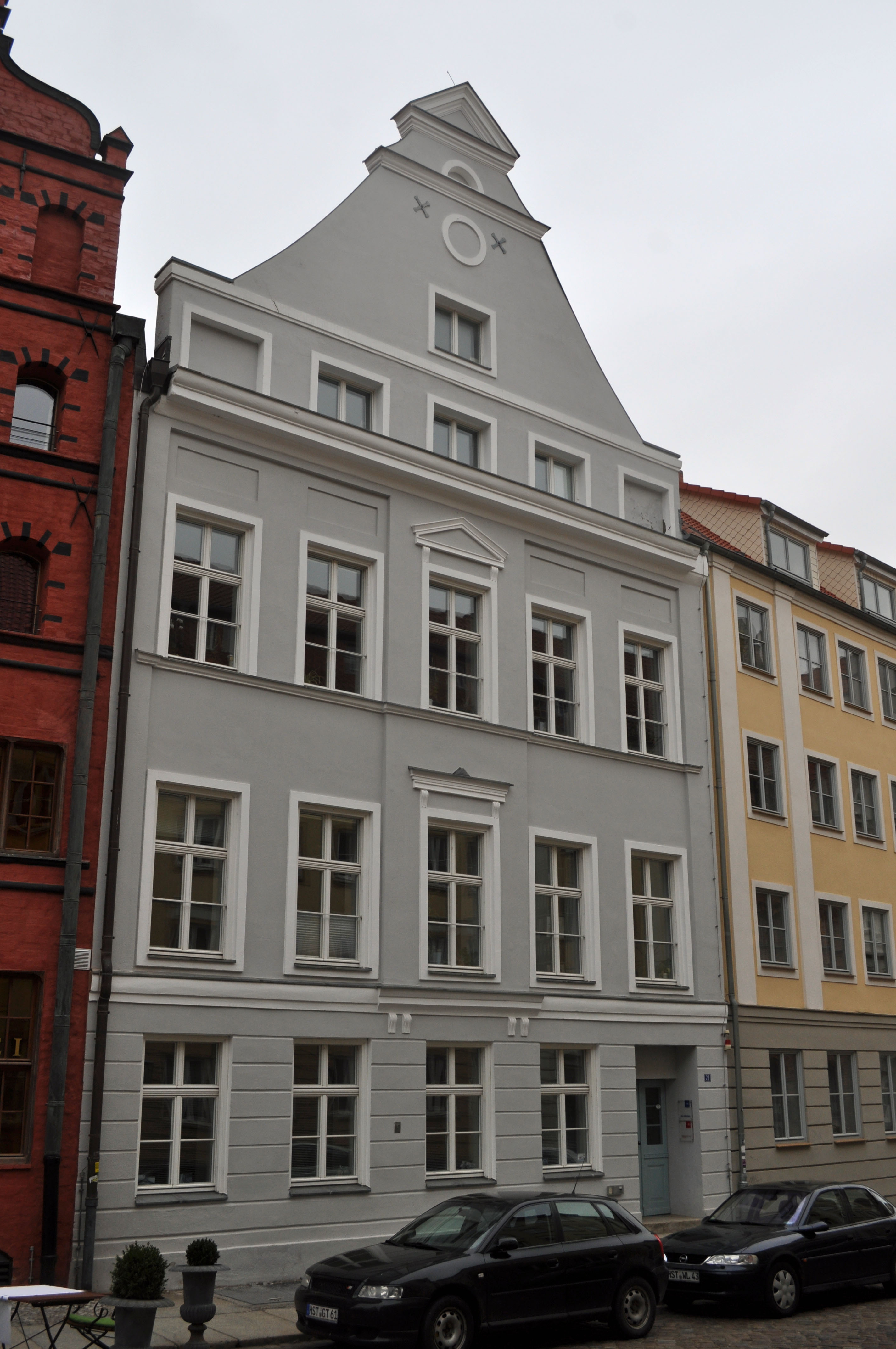 Gebäude bzw. Gebäudedetail in Stralsund. Straße und Hausnummer siehe Dateiname.